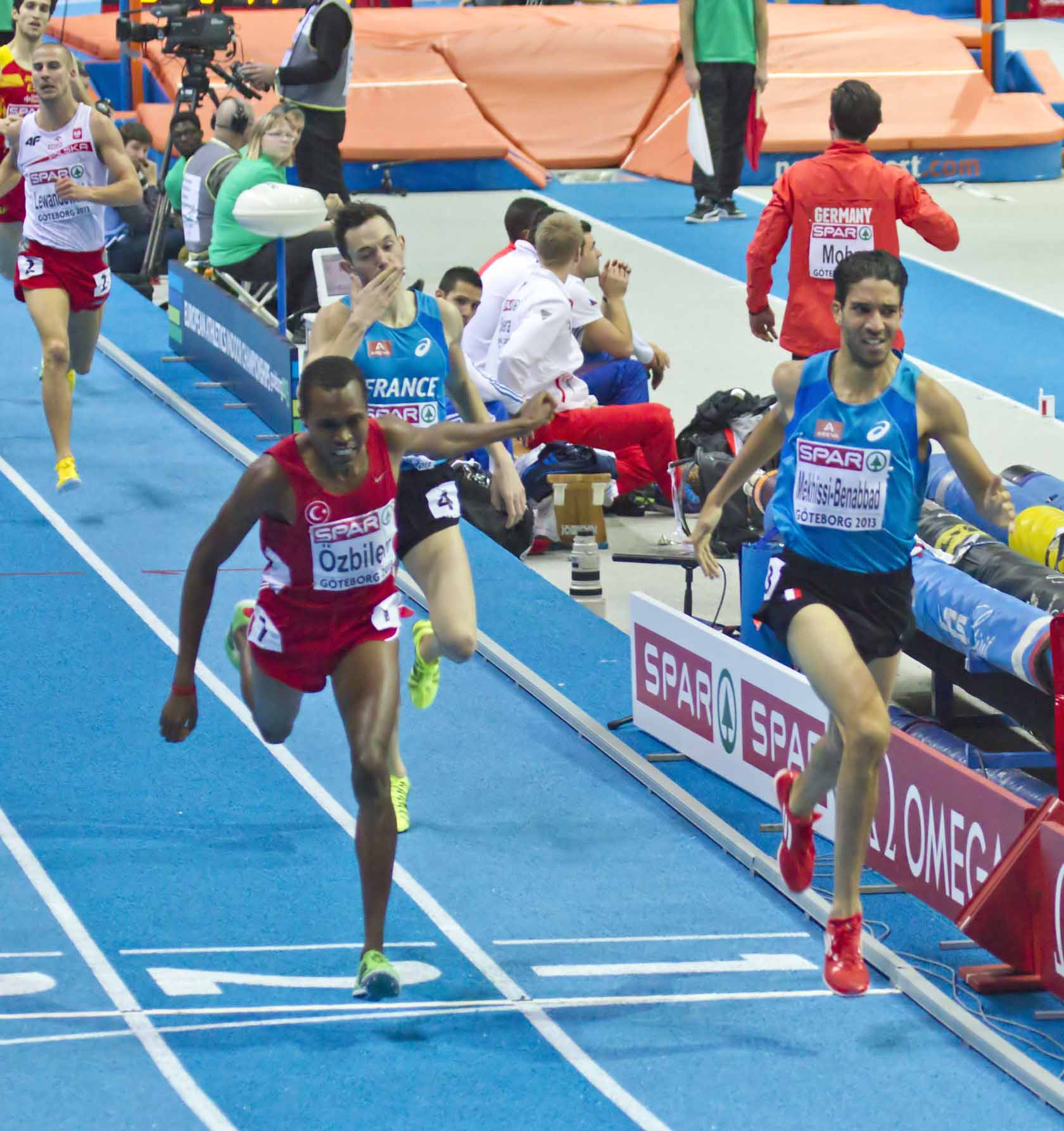 9212 finale 1500m